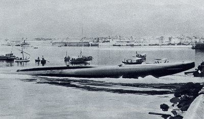 das von Zédé konstruierte U-Boot wird am 1. Juni 1893 in Toulon zu Wasser gelassen